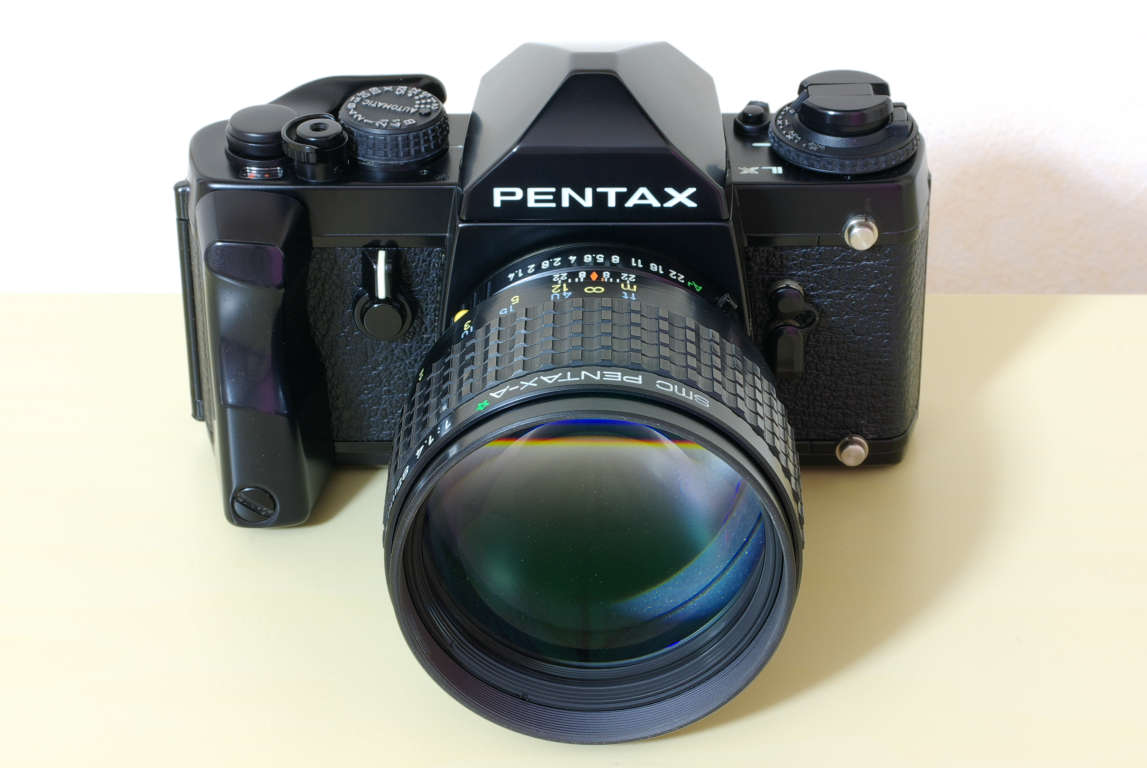 smc PENTAX-A☆ 1:1.4 85mm